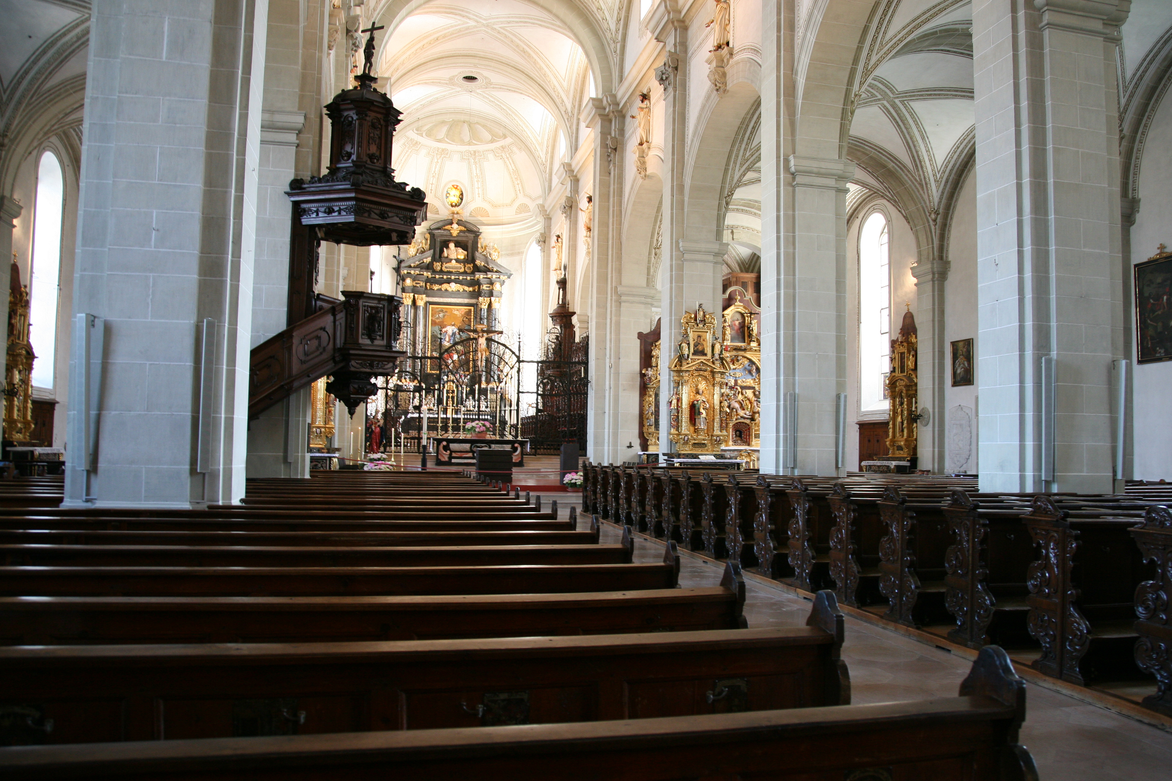 Hofkirche innen, Sicht nach vorne